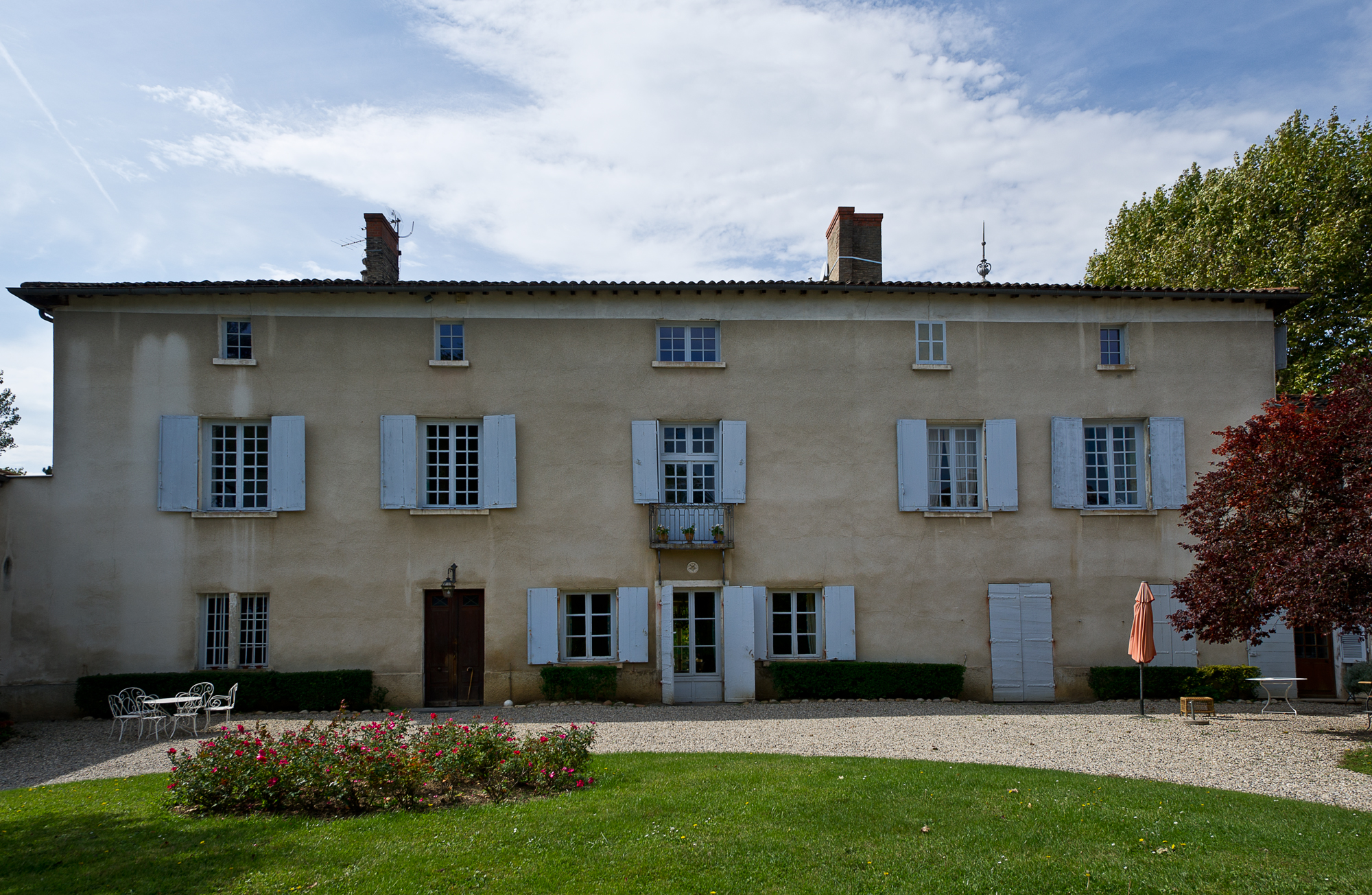 Maison, 62 rue Professeur-Deperet (Classé, 2008) .